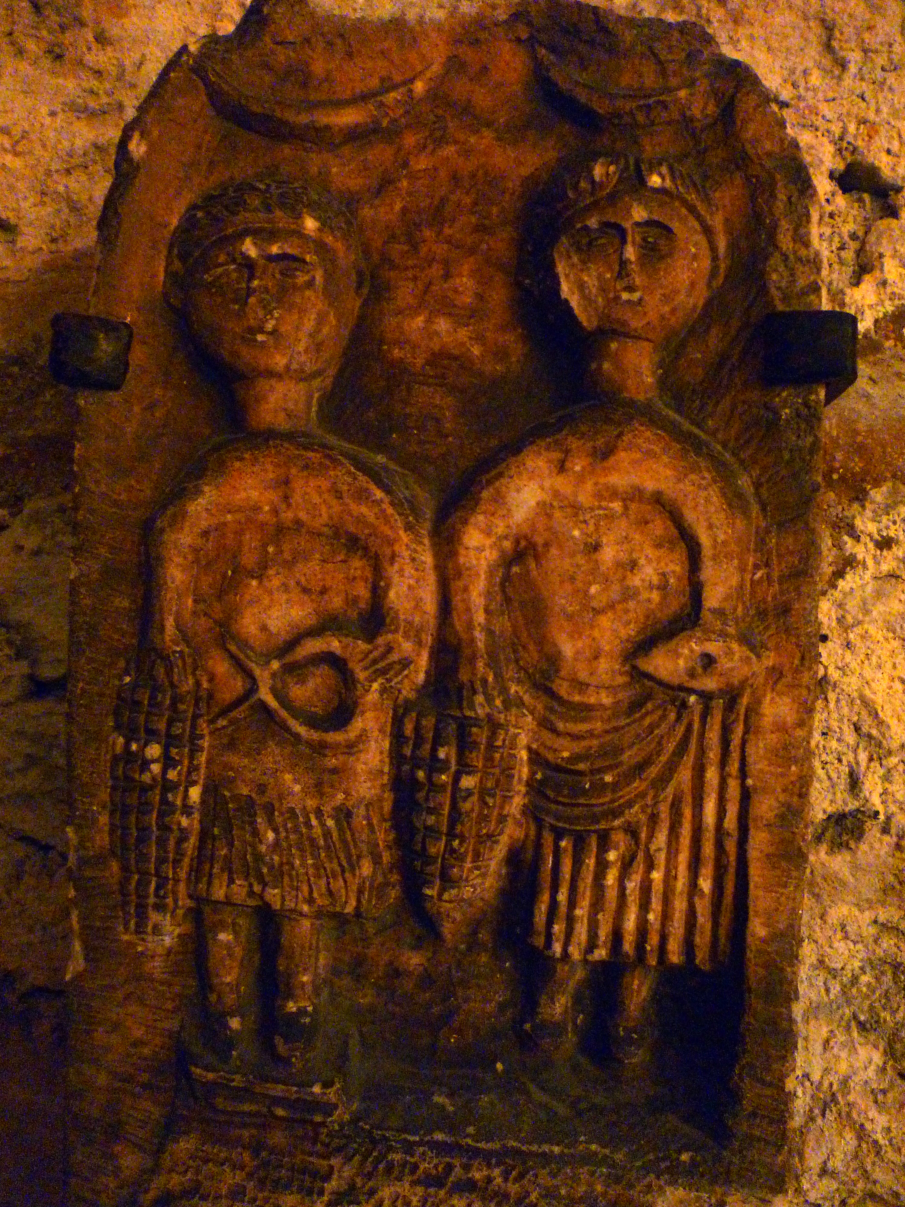 Stèle romaine découverte à Jessains (Aube) et conservée au Musée Saint-Loup de Troyes.